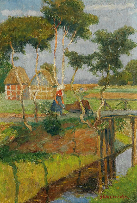 Moorbrücke. Öl auf Malpappe. Rechts unten signiert. Verso von fremder Hand betitelt und bezeichnet. 28 x 19 cm